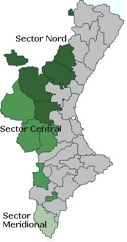 Sectors lingüístics del castellà al Pv (corregit)